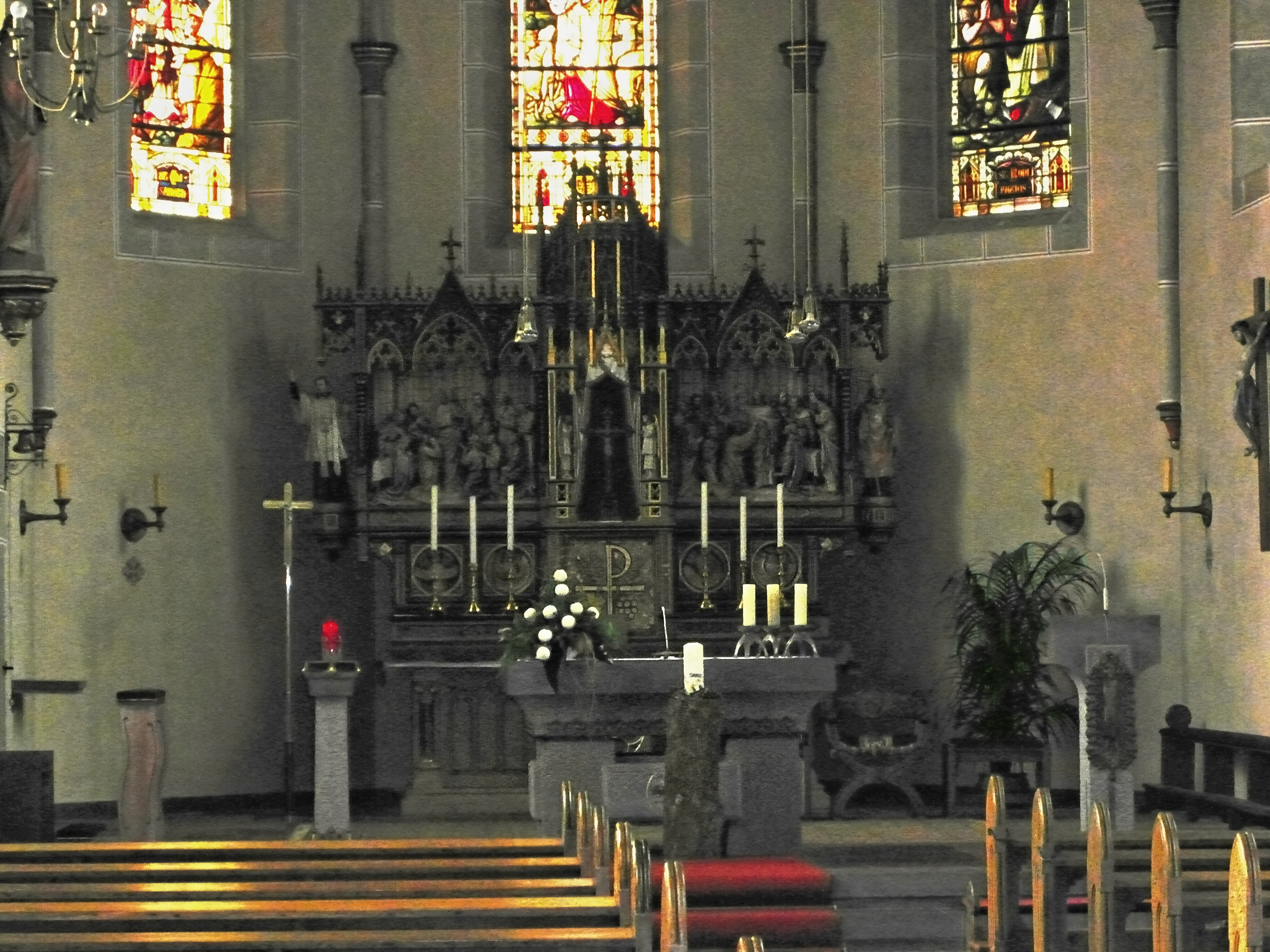 Chorraum St. Antonius Einsiedler, Altarretabel von Matthias Beule